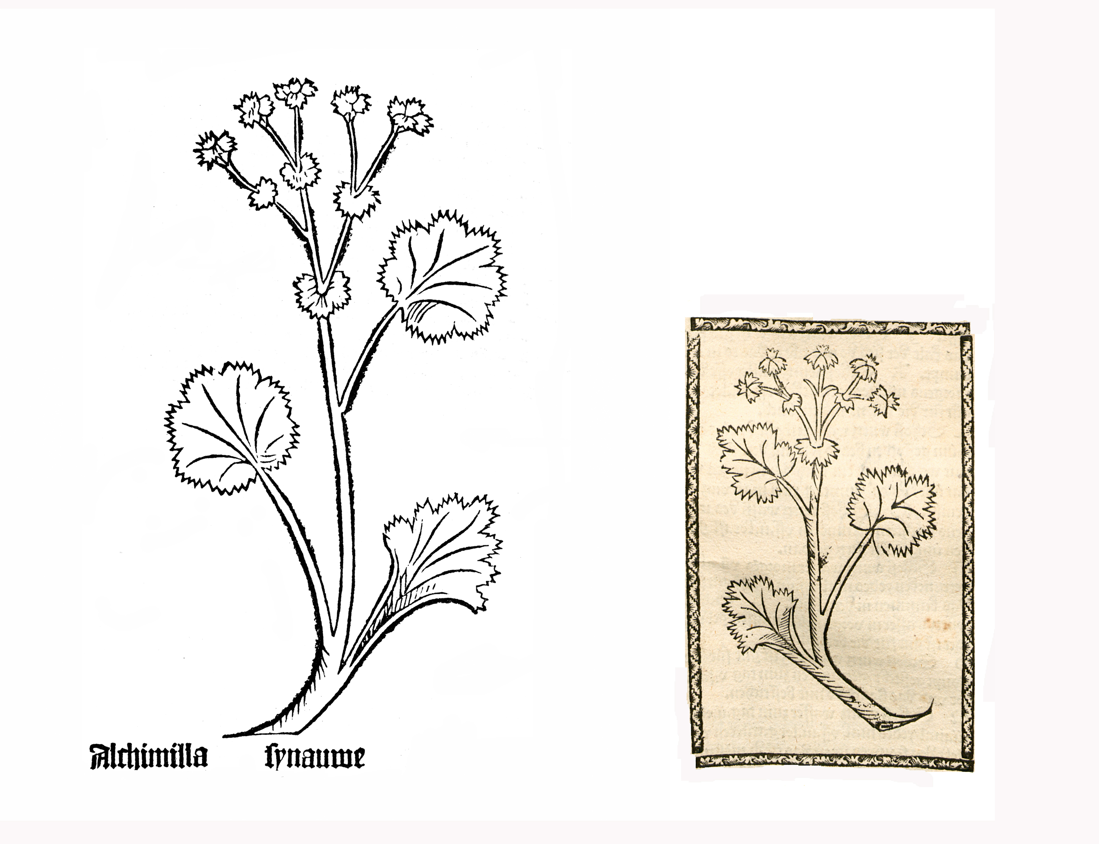 Abbildung von Synnow (Alchemilla xanthochlora)